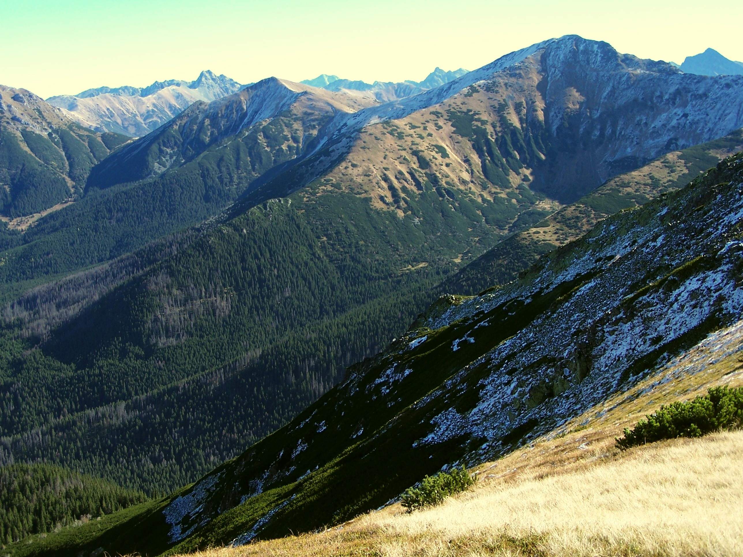 Dolina Tomanowa i Pyszniańska. Ugóry od lewej:Ciemniak, Tomanowa Przełęcz, Tomanowy Wierch, Smreczyński Wierch. Widok z okolic Siwej Przełęczy.